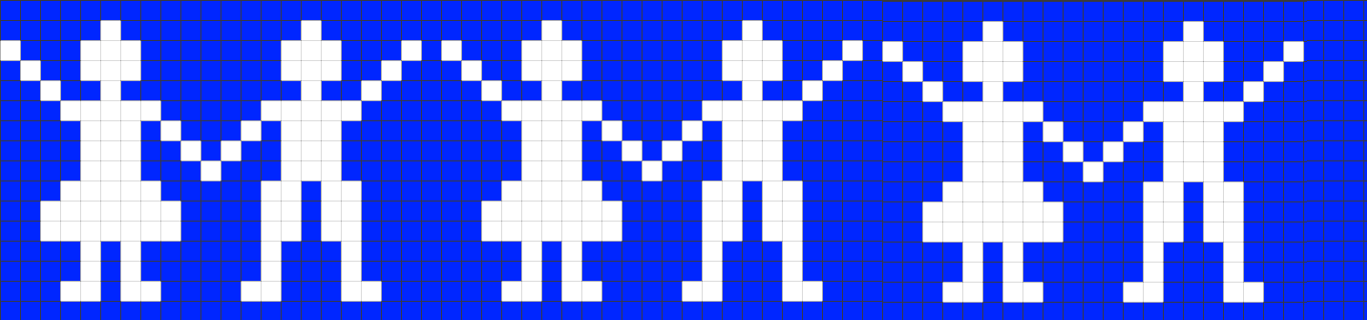 Motif tricot norvégien frise de danseurs